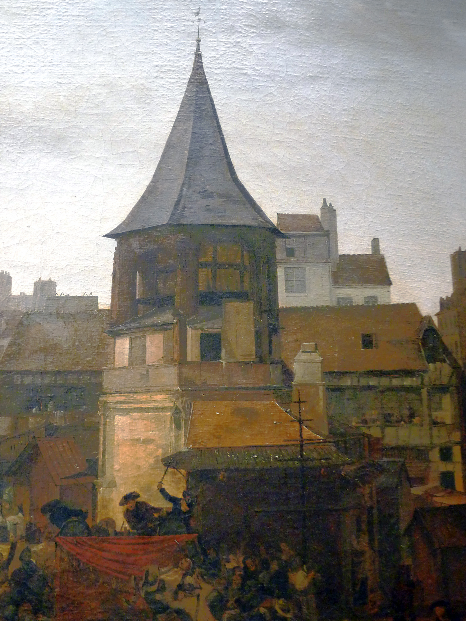 detailRéjouissances données par la Ville de Paris aux Halles, le 21 janvier 1782, à l’occasion de la naissance du dauphin. Détail montrant le pilori